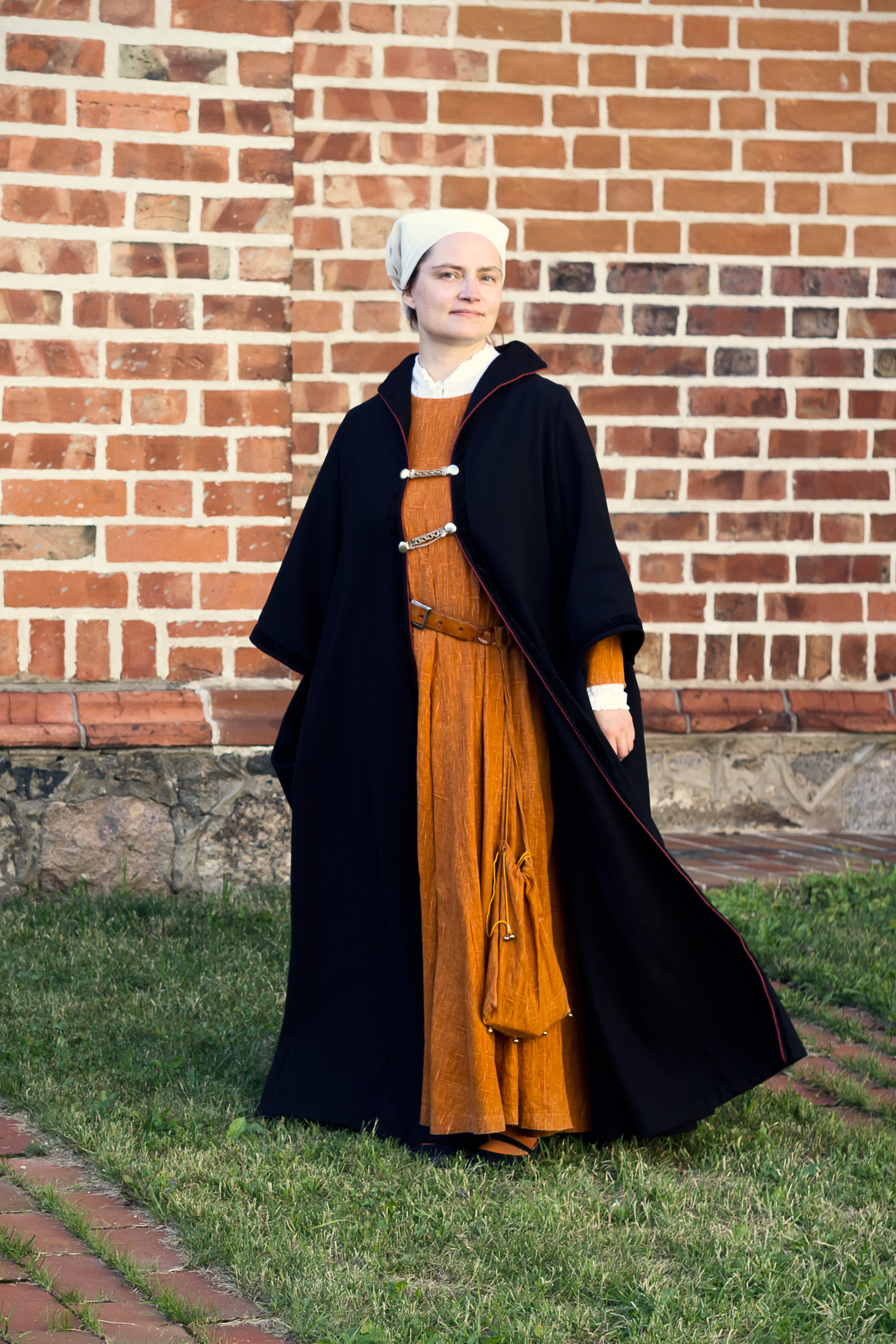 Eva Lepik Tartu hansapäevadel 2013